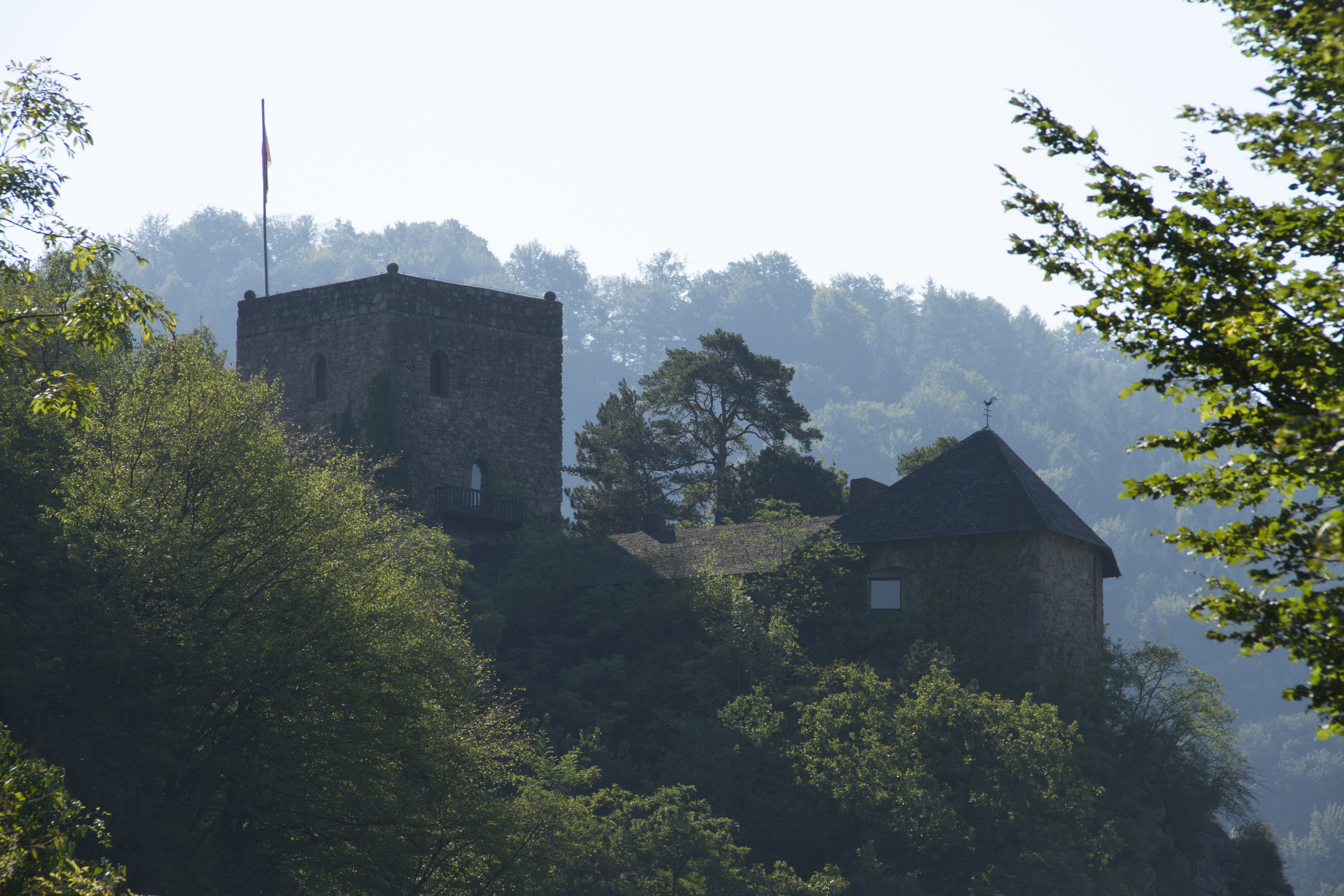 Burgruine Werfenstein